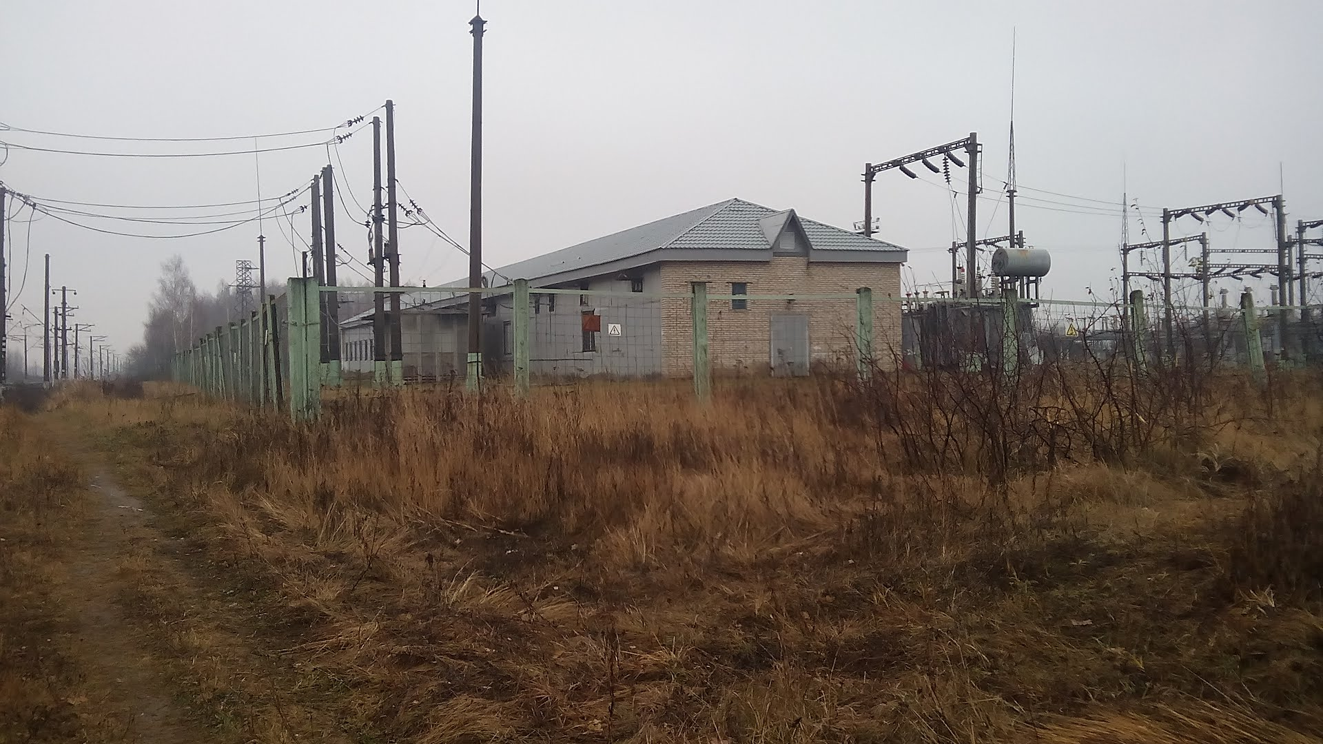 Тяговая электроподстанция «Житово», Козловка, Рязанская область